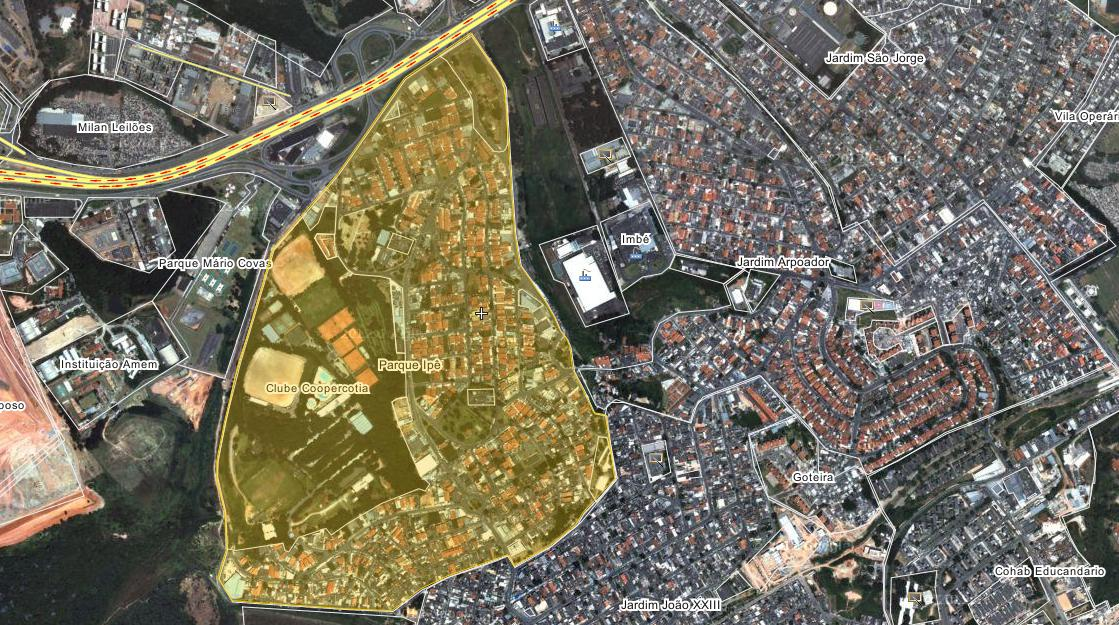 Mapa do Parque Ipê